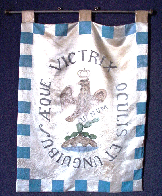 Bandera del Regimiento de San Fernando, también llamada Estandarte de Morelos.